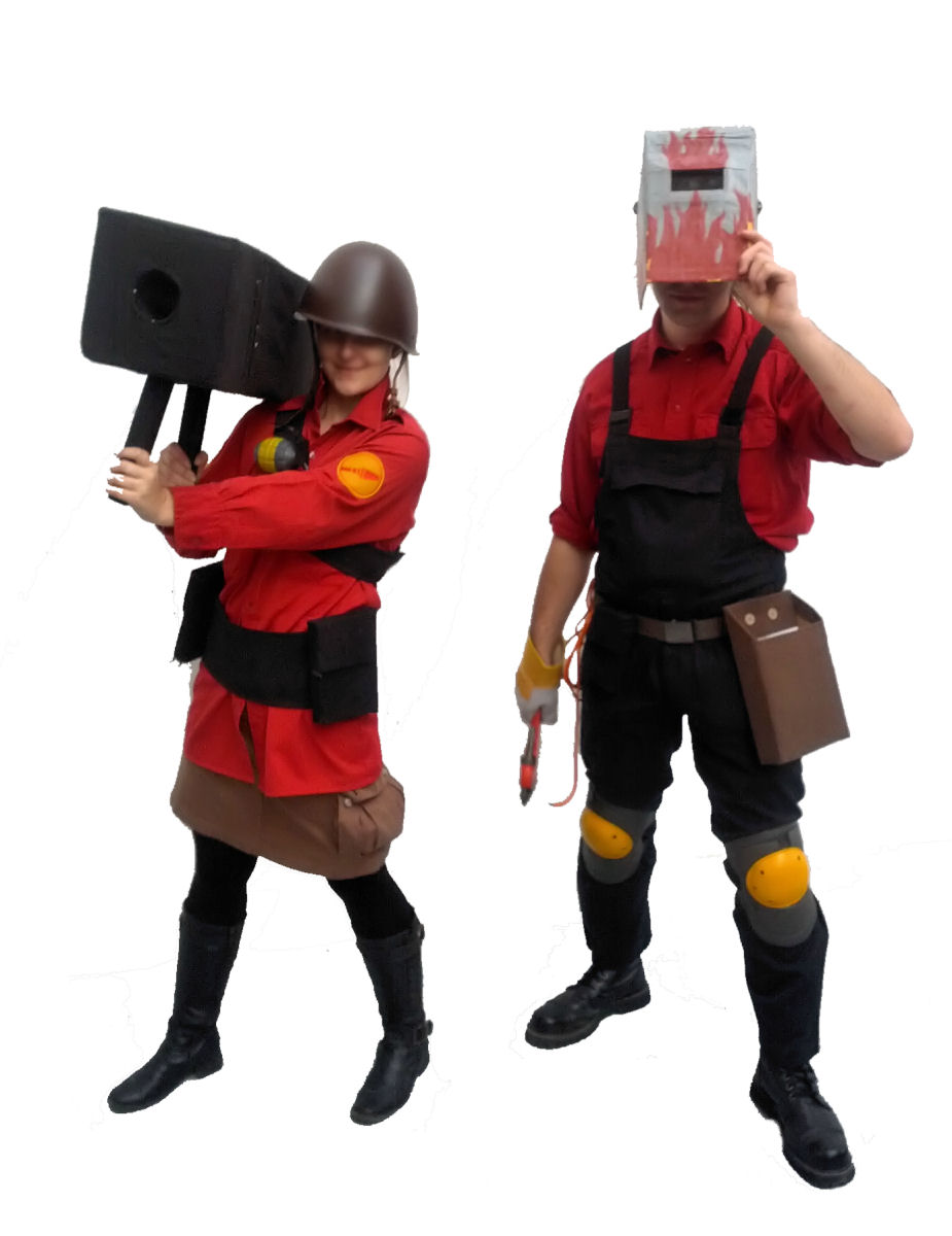 Kostiumy postaci z gry komputerowej Team Fortress 2. Wycięte tło. Targi PGA, Poznań, Polska.